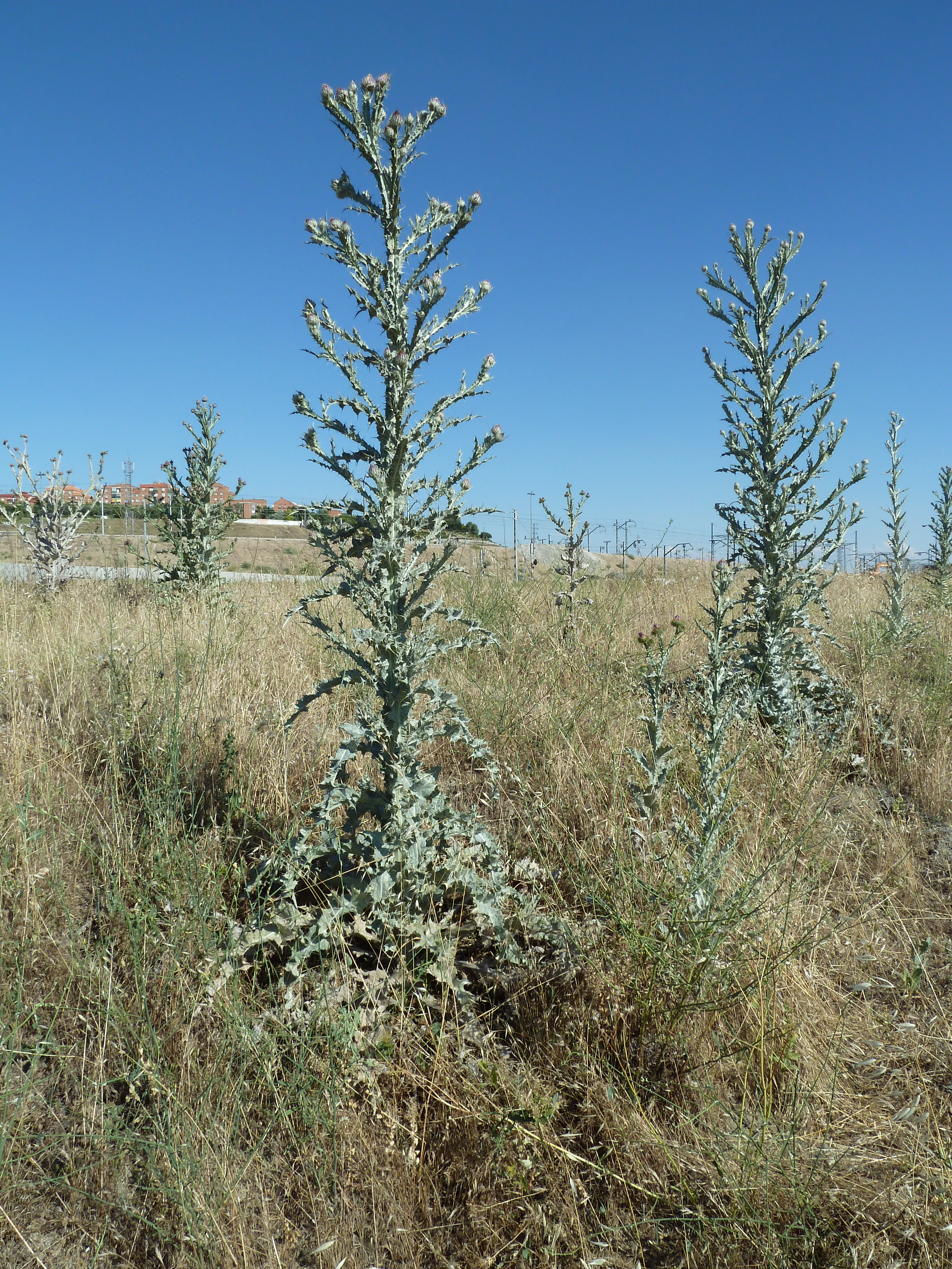 Onopordum nervosum - (Cardo gigante) - Vista de una pradera primaveral típica de los alrededores de Madrid - Circa Estación de Contenedores de RENFE-ADIF de Abroñigal/Embajadores, Madrid (España).